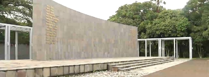 Monumento Proceres. Donde se encuentran los restos de Manuel Jose Arce. segun la leyenda Arce murió en la pobreza en San Salvador el 14 de diciembre